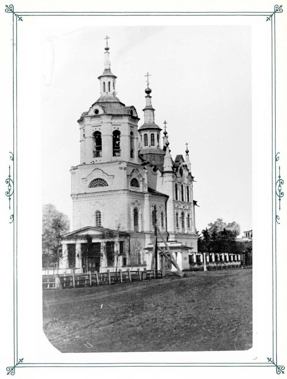 Первоначальный вид Спасской церкви в Тюмени, до пристроев.